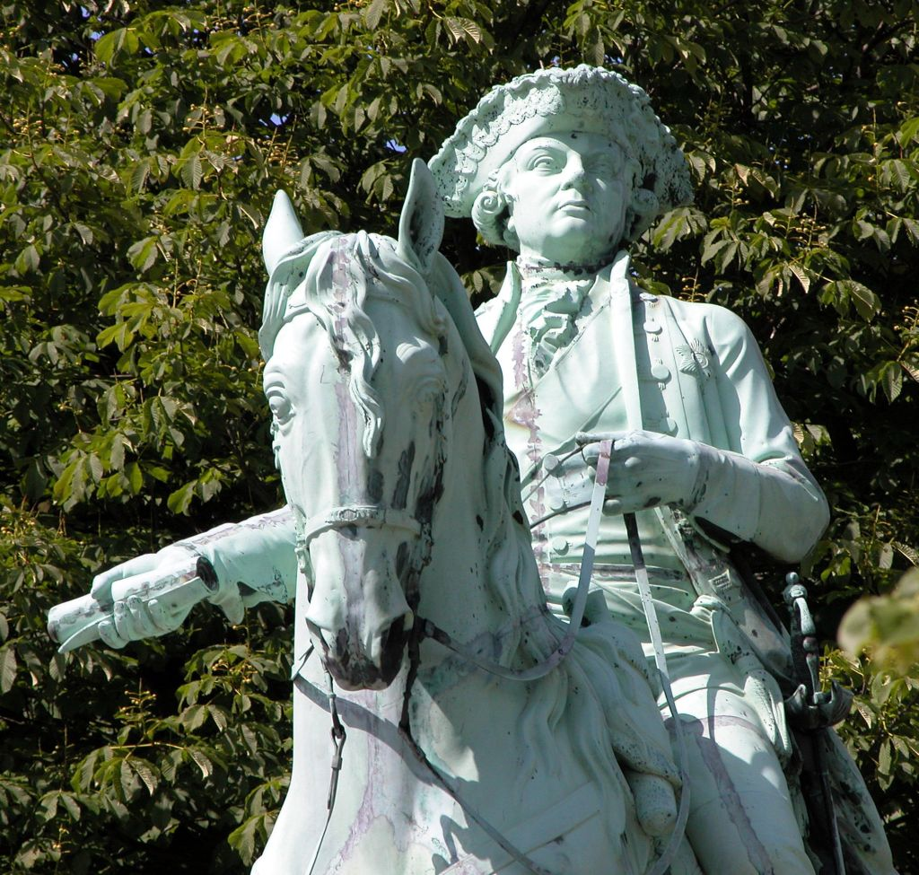 Braunschweig: Detail des Reiterstandbilds von Karl Wilhelm Ferdinand von Braunschweig. Bildhauer: Franz Pönninger